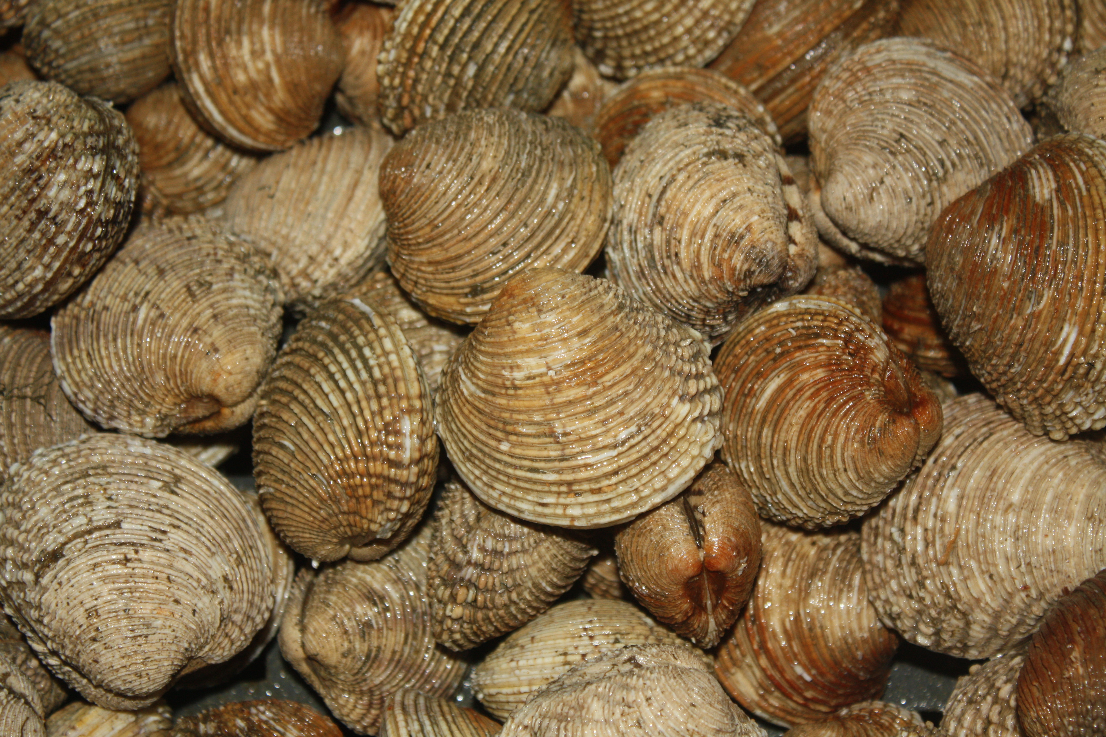 Carneiros (Venus verrucosa)